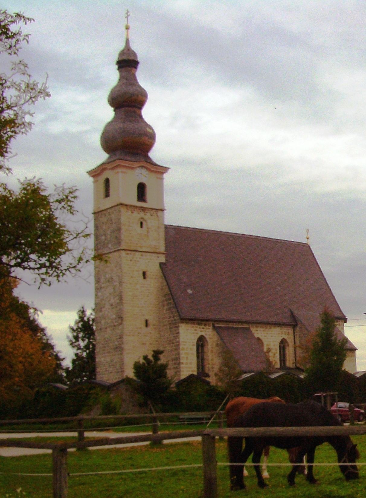 St. Martin in Pietling, Gemeinde Fridolfing